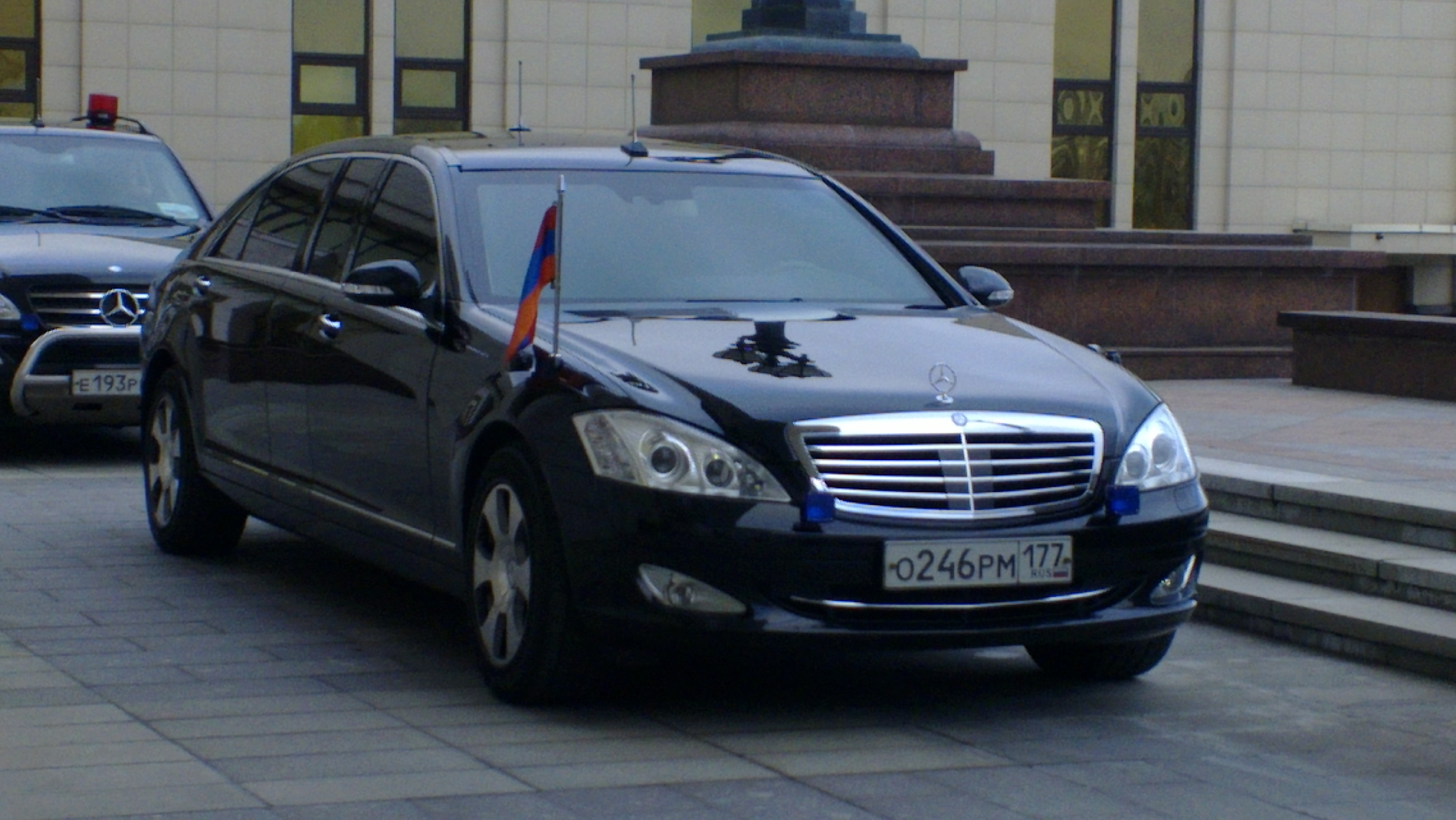 2011 թ. հոկտեմբերի 24: ՀՀ պատվիրակության այցը Մոսկվայի Պետական Համալսարան (միջոցառումը տեղի է ունեցել Հիմնակազմ գրադարանում) ՀՀ Նախագահ Սերժ Սարգսյանի գլխավորությամբ: Գրադարնի մոտ կանգնած ավտոմեքենաները, առաջի պլանին՝ ՀՀ Նախագահի ավտոմեքենան:Unknown 2011 october 24. delegation from armenia in moscow state university (fundamental library) headed by the president of armenia sej sargsyan. cortege of armenian delegation. on first plan armenian president's car.